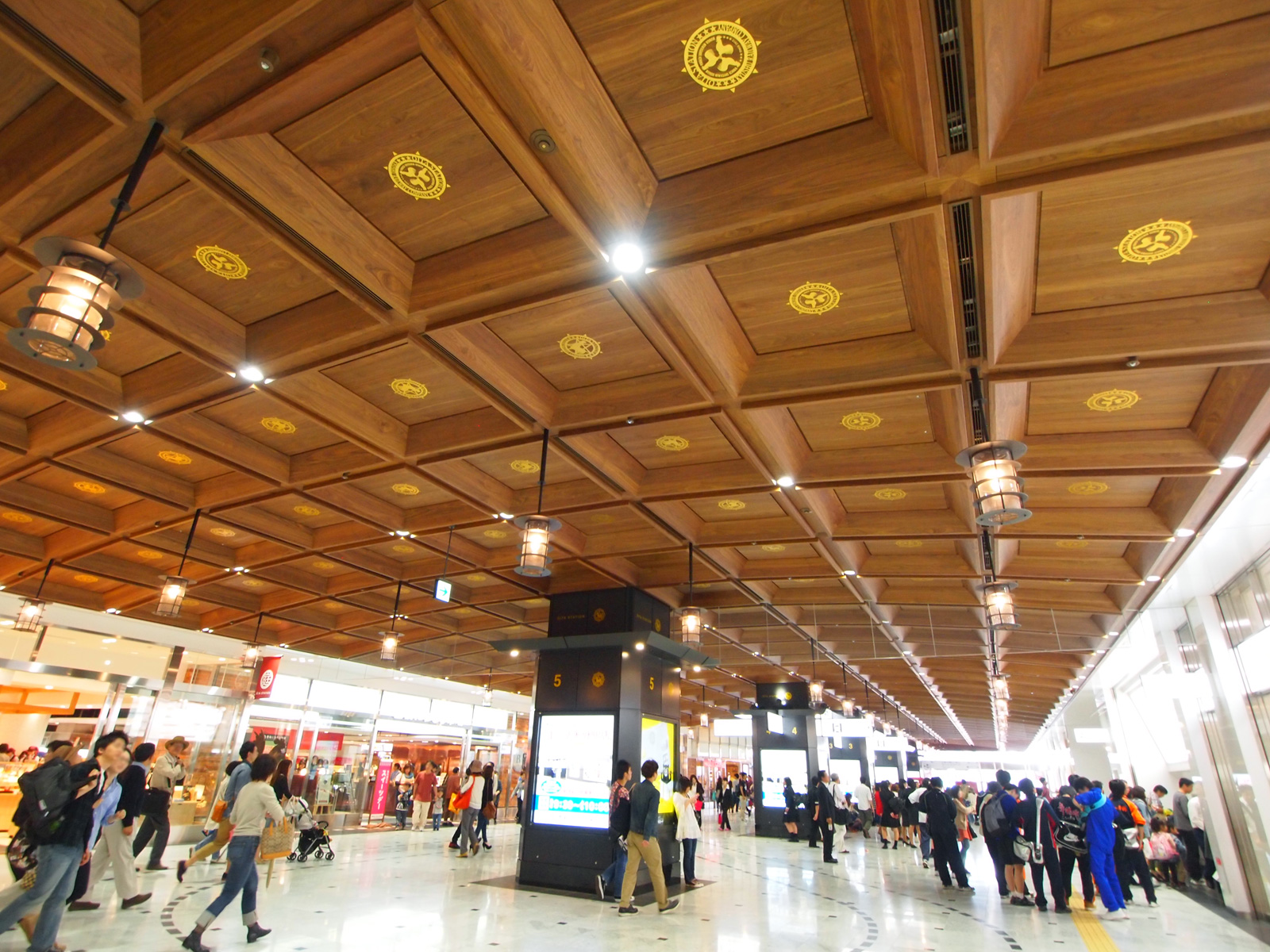 JR大分駅コンコース（大分県大分市）